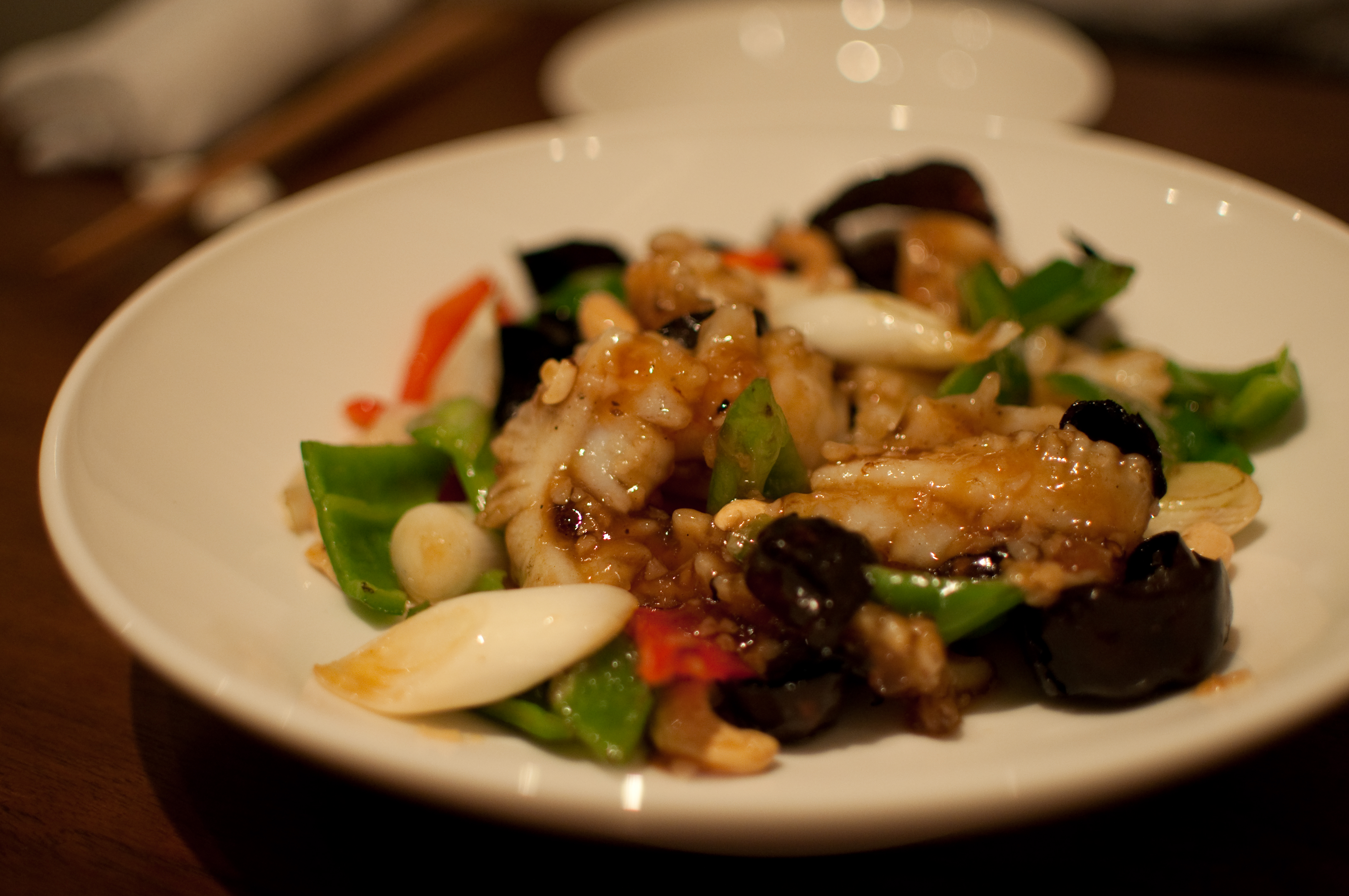 Coolie's Creek